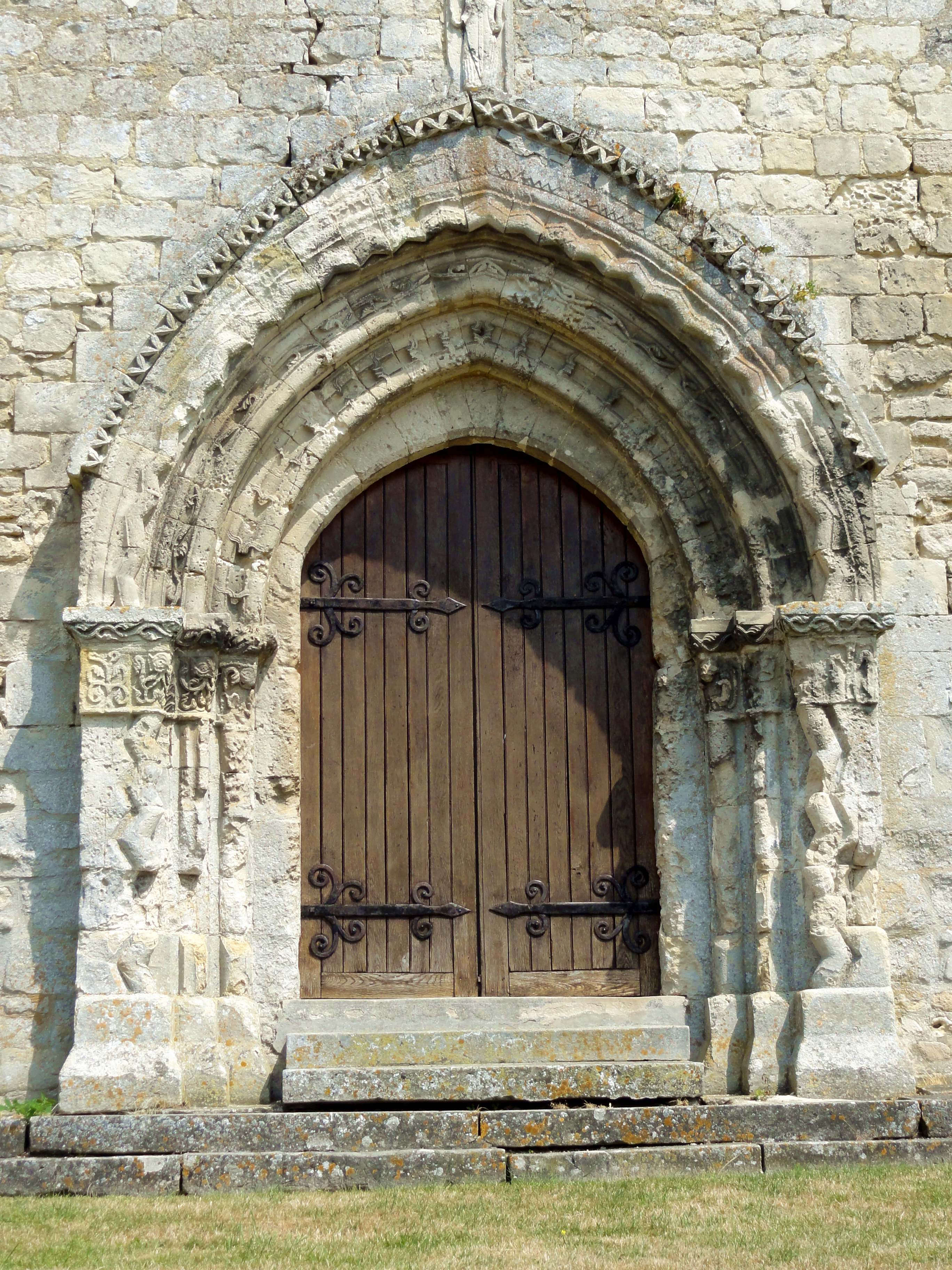 Église Saint-Lucien d'Ansacq (voir titre).